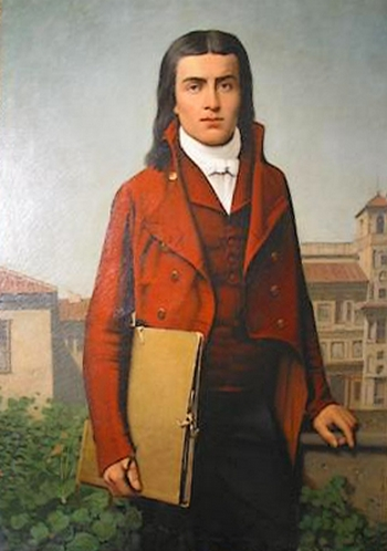 Portrait du sculpteur Jacques-Félix Brun (1763-1831), Musée d’Art de Toulon, dépôt du FNAC (image redressée).